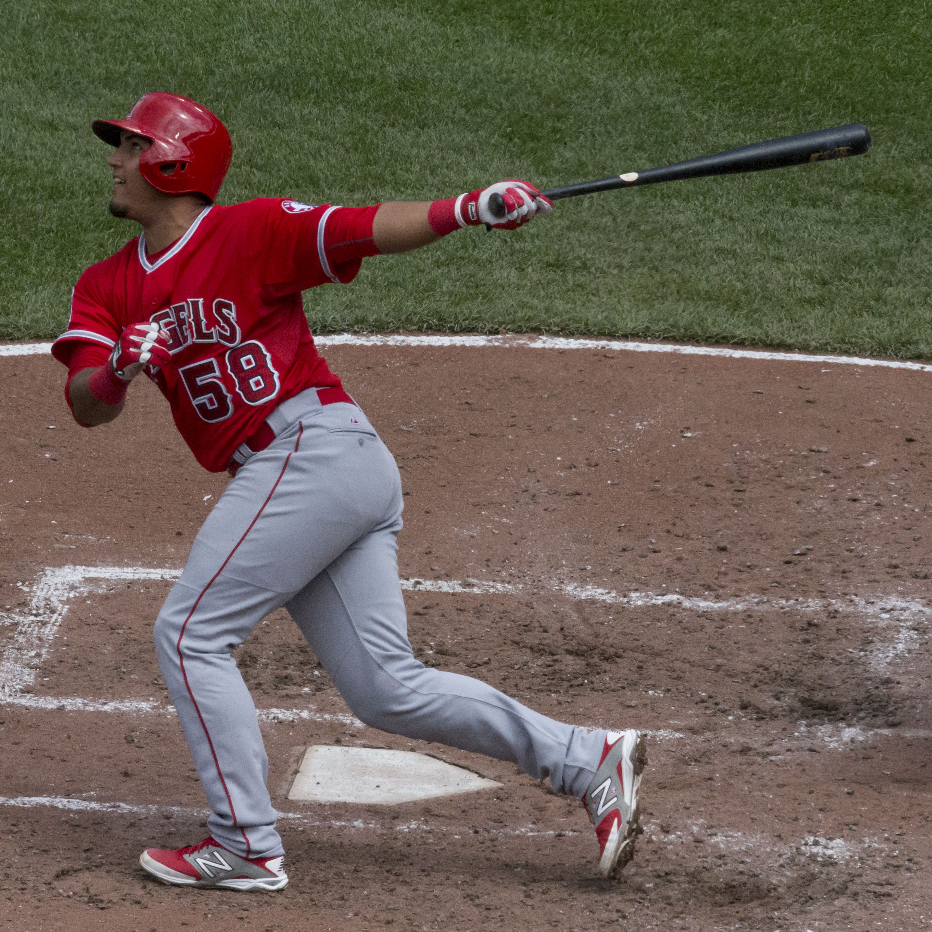 Carlos Pérez